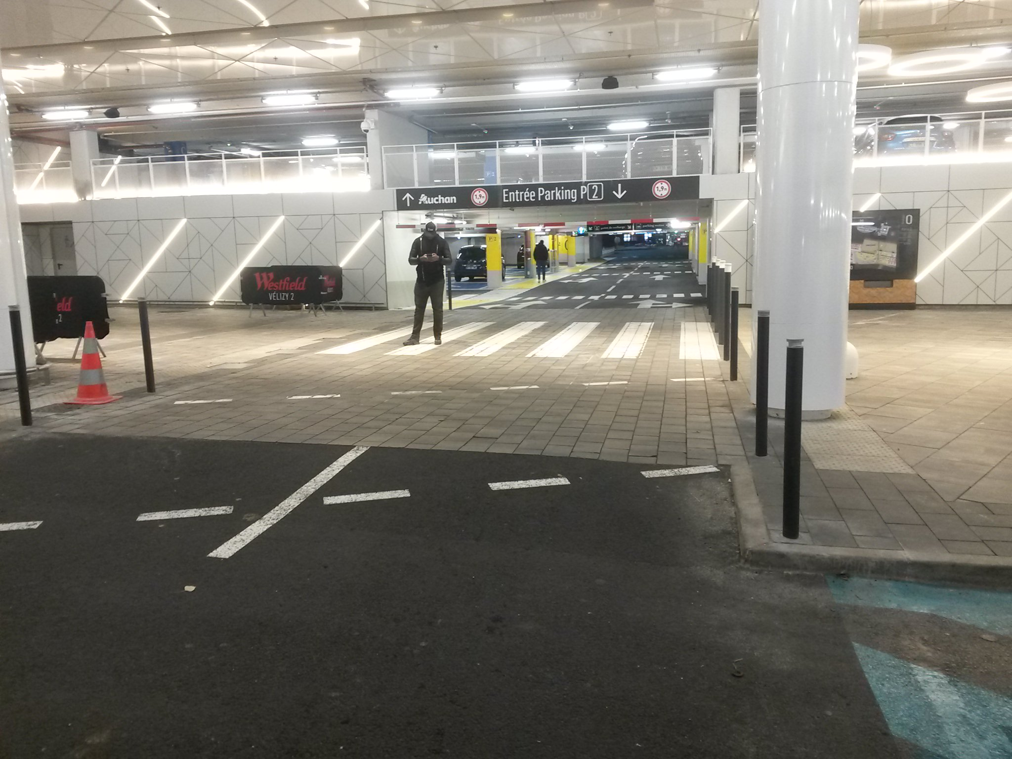 Cet aménagement, dans un parking bas du centre commercial Vélizy 2, constitue un exemple de passage piéton aménagé en trottoir traversant. Le relèvement et le revêtement de la chaussée présentent la chaussée comme coupant le trottoir, et non l'inverse, matérialisant le fait que les piétons y ont une priorité absolue.